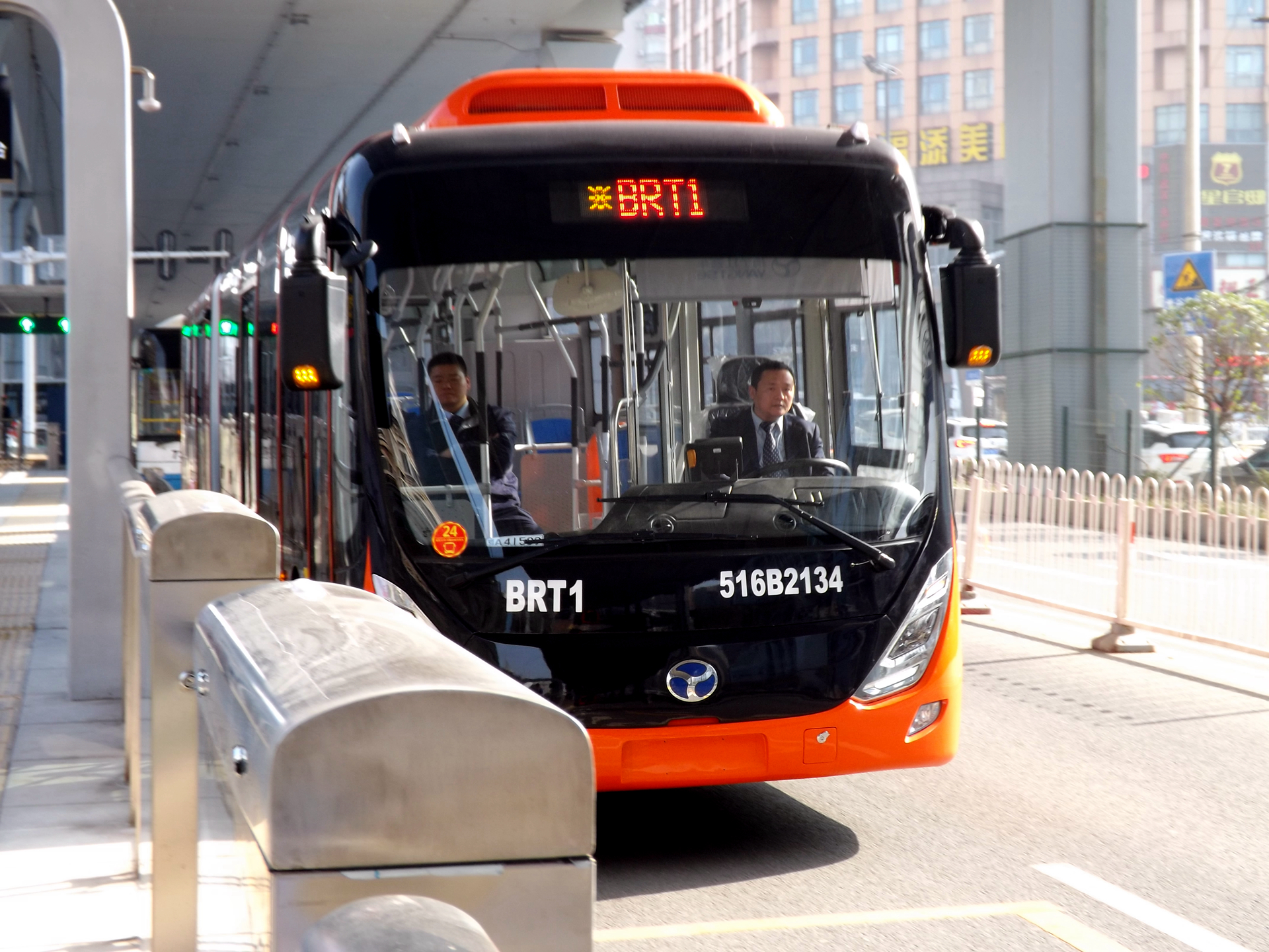 2016年12月28日上午摄于民族大道站内，BRT1正在进行当晚17点载客运营前最后的测试